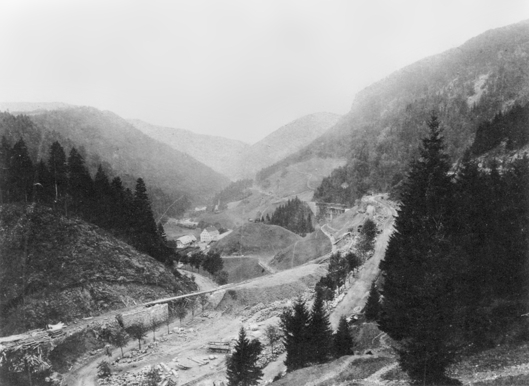 Bau der Höllentalbahn um 1885 oberhalb des Ravennaviadukts mit Feldbahn auf der Trasse und Plateau für Bahnwärterhaus